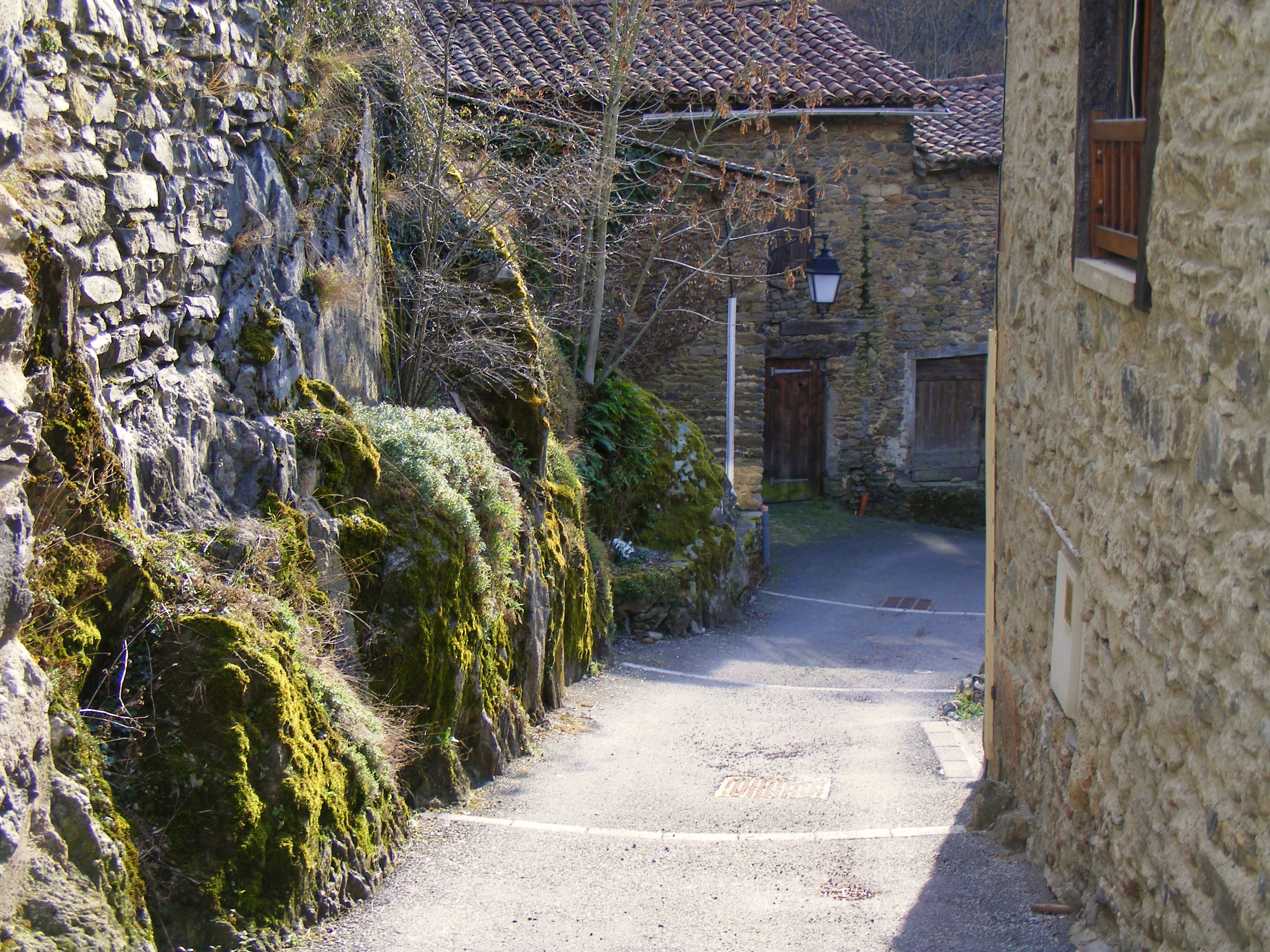 Anciennes rues à Chagnon (France)